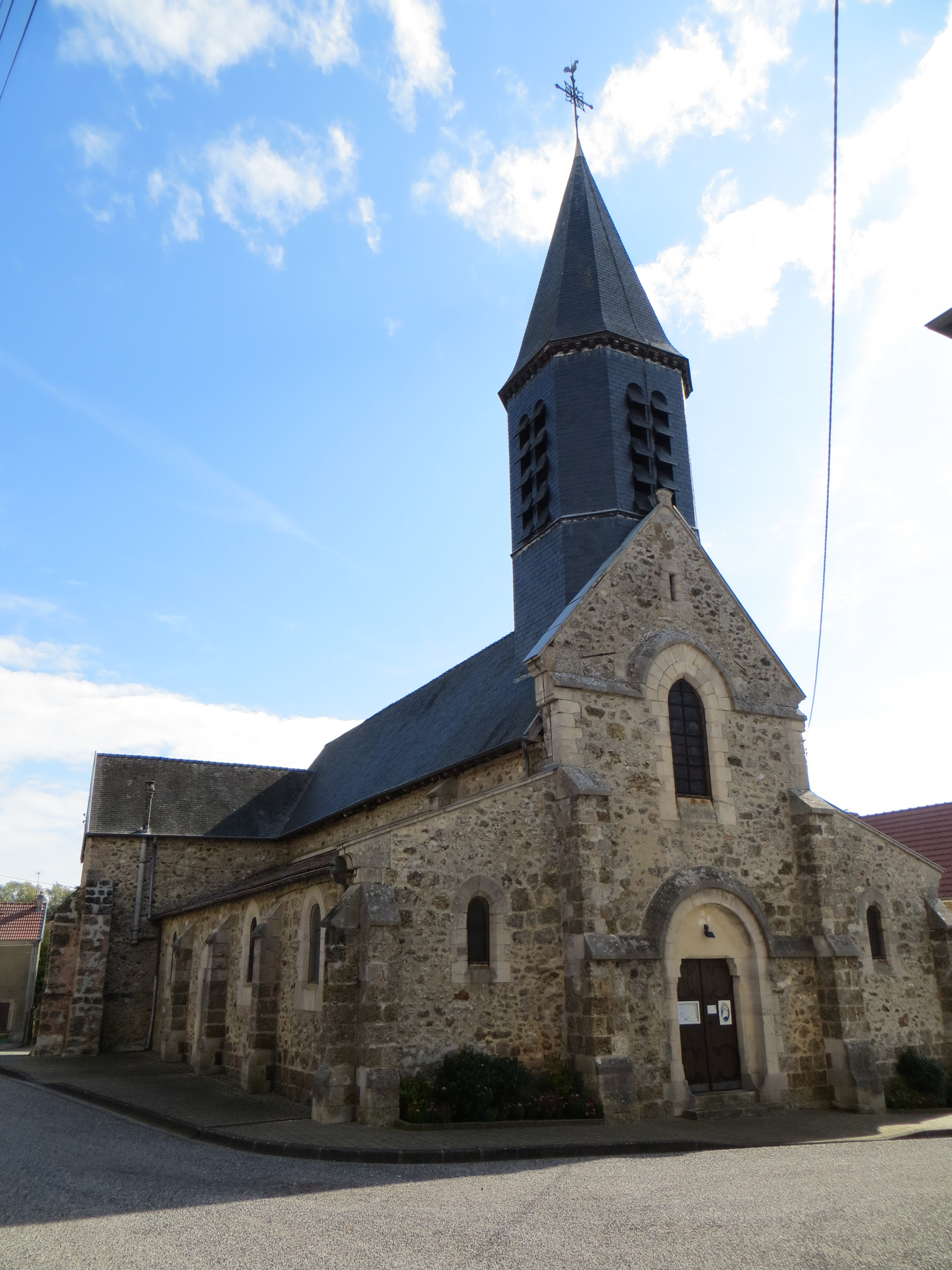 Vue générale de l'église